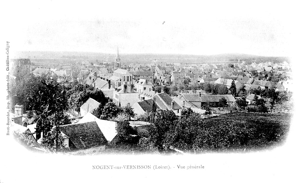 Nogent-sur-Vernisson, Loiret, France